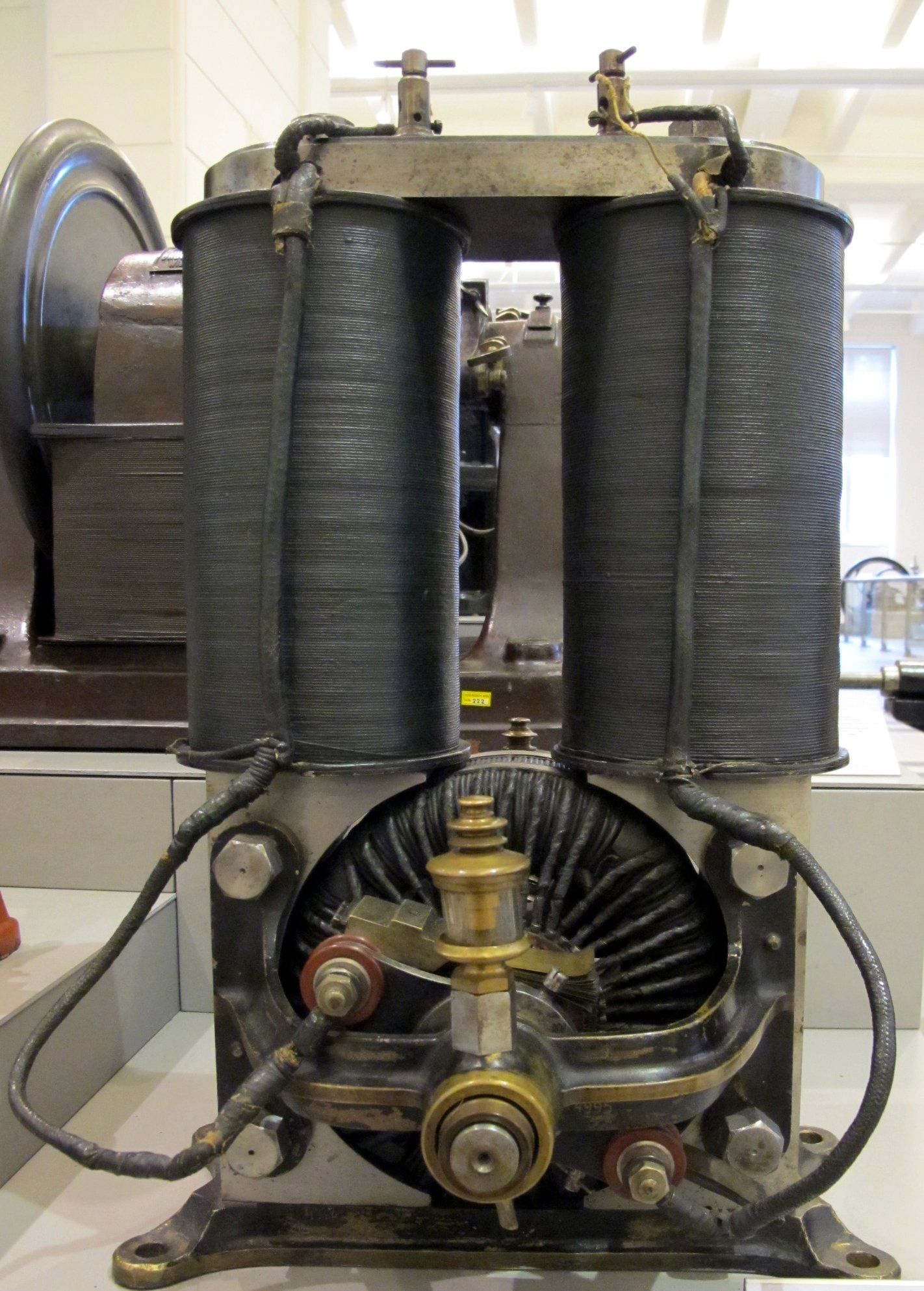 Gleichstromgenerator von Kremenezky, Mayer & Co welche ähnlich wie die ersten Gleichstrommaschinen von Edison aufgebaut ist. Sie weist jedoch im Gegensatz eine Ringankerwicklung nach Gramme auf.